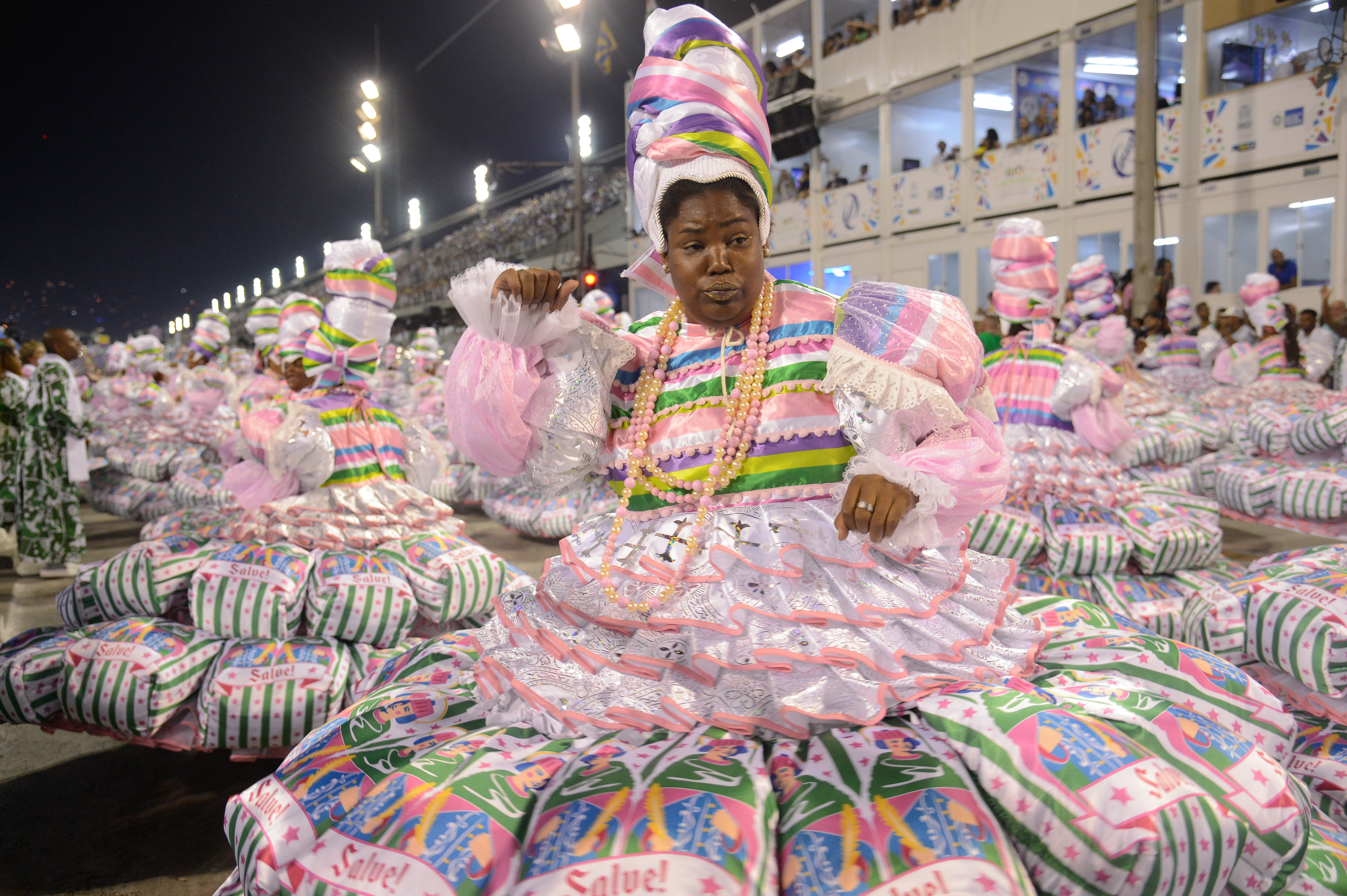 Rio de Janeiro - Desfile da escola de samba Mangueira, pelo grupo especial, no Sambódromo (Fernando Frazão/Agência Brasil)